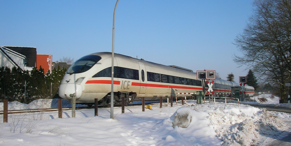 ICE am Sereetzer Weg in Ratekau, Schleswig-Holstein